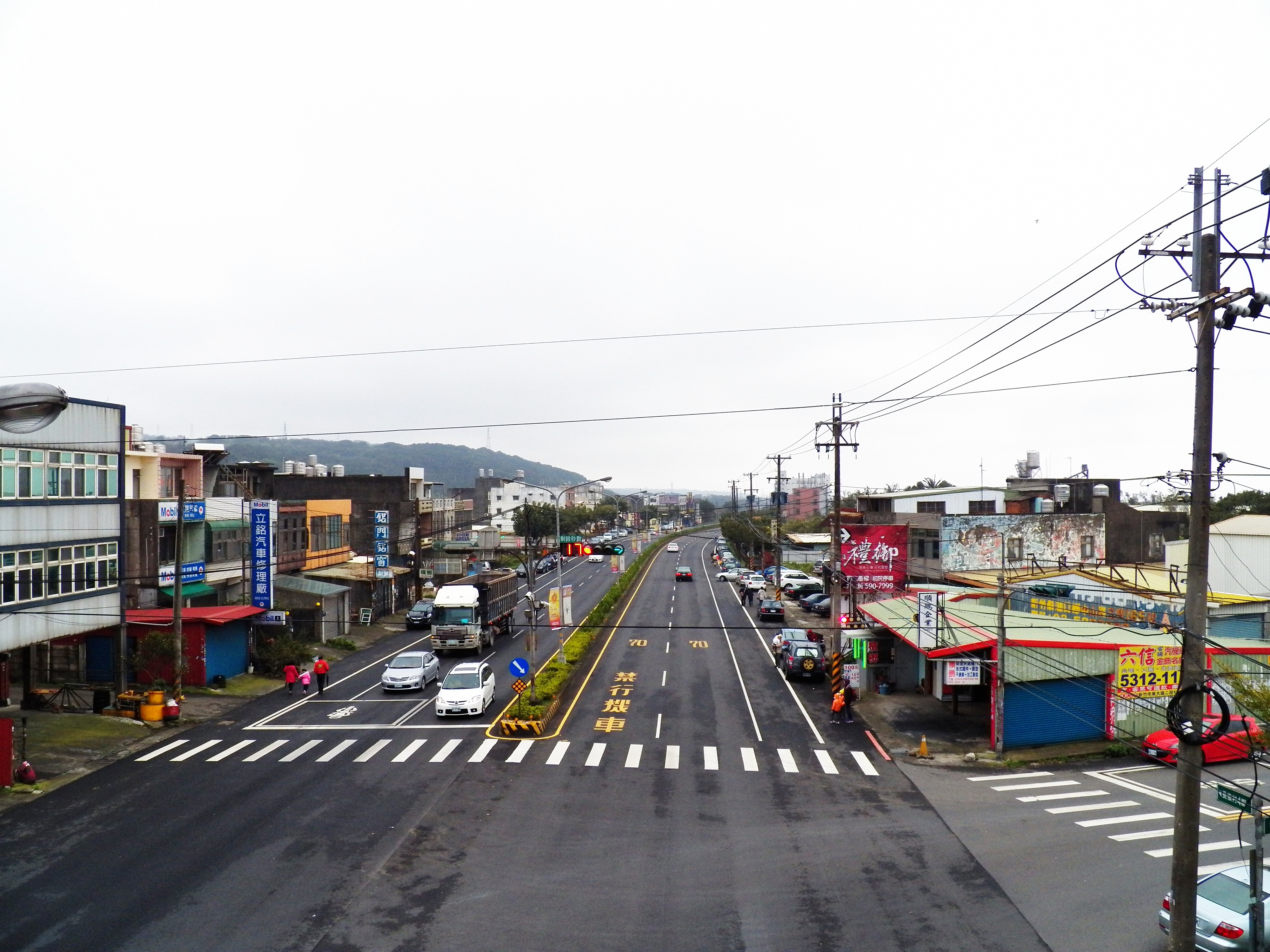 從新竹縣湖口鄉長安陸橋西南俯望八德路三段（省道臺一號）。